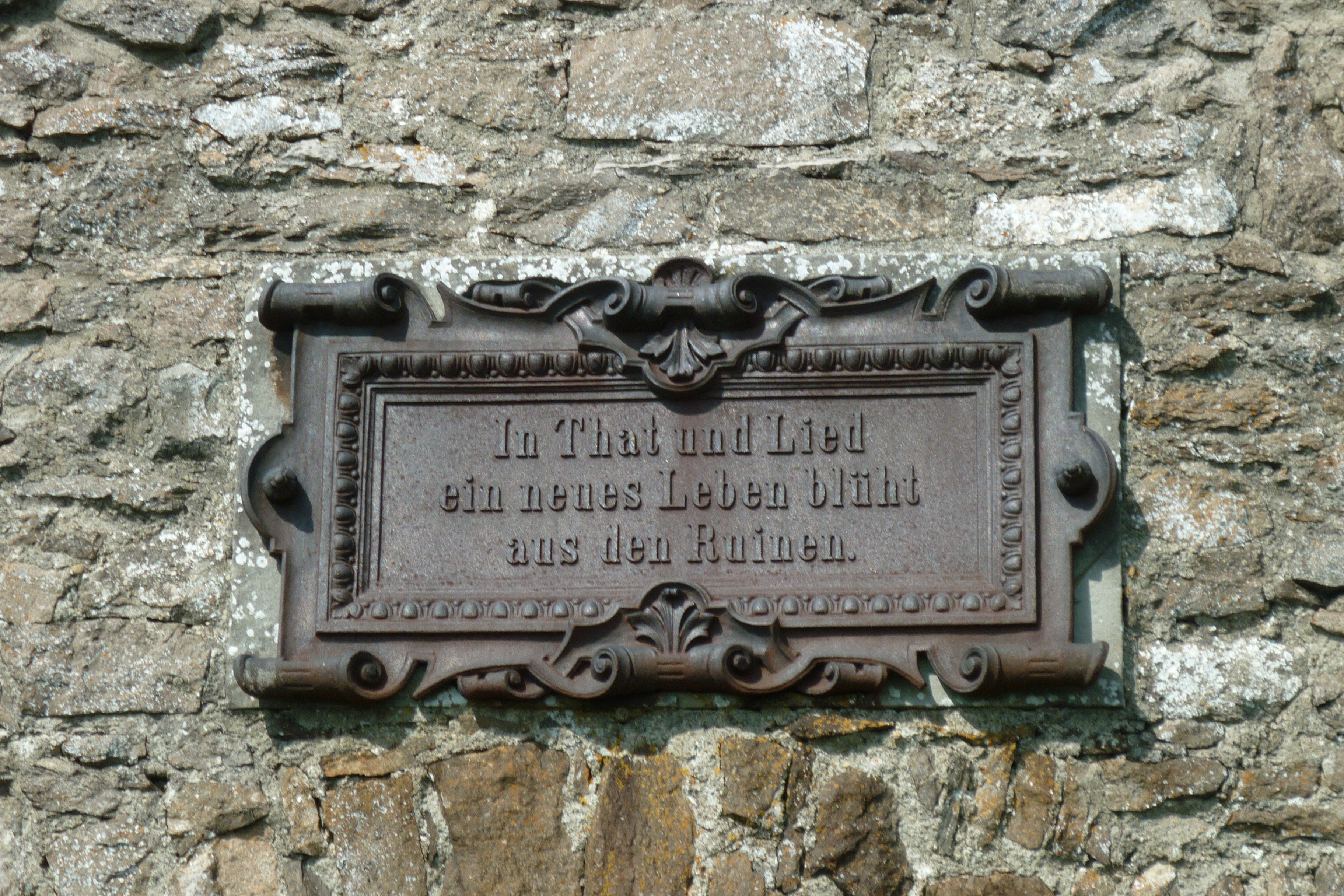 Singen - Festungsruine Hohentwiel: Inschrifttafel „In That und Lied ein neues Leben blüht aus den Ruinen“